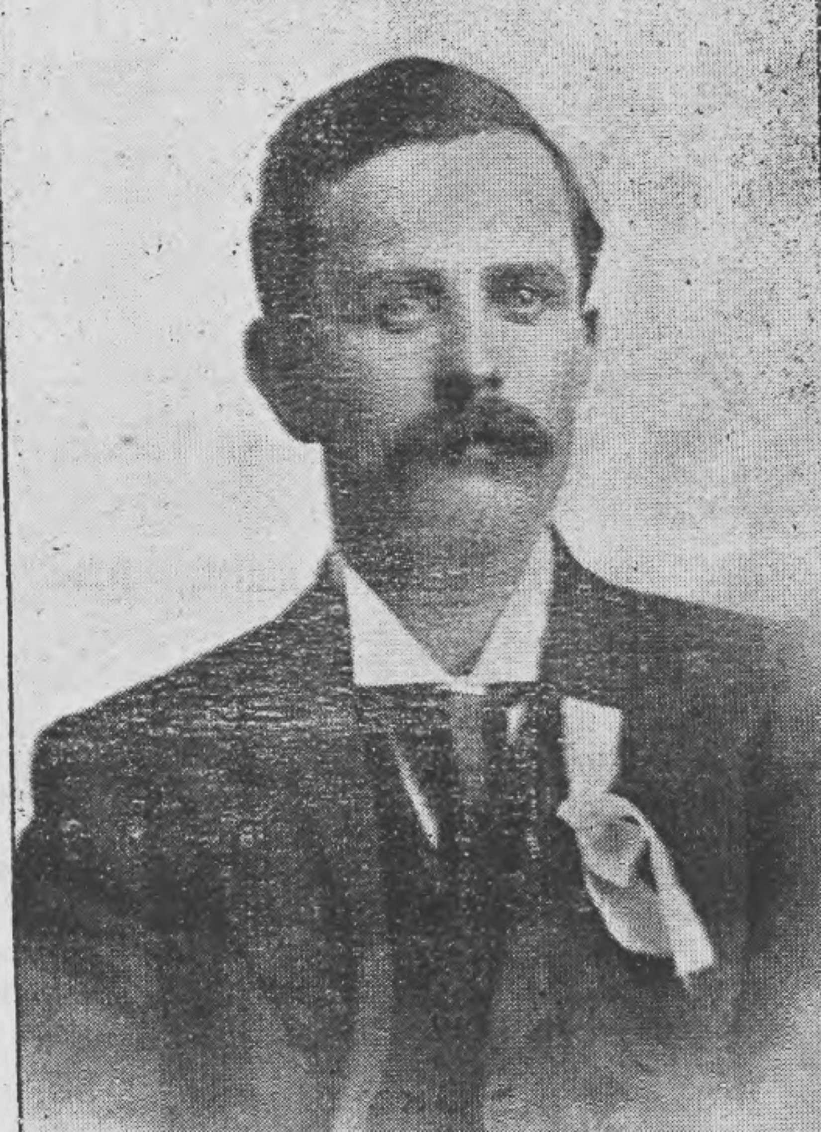 John Thomas Job Gweinidog, bardd ac emynydd Cymreig